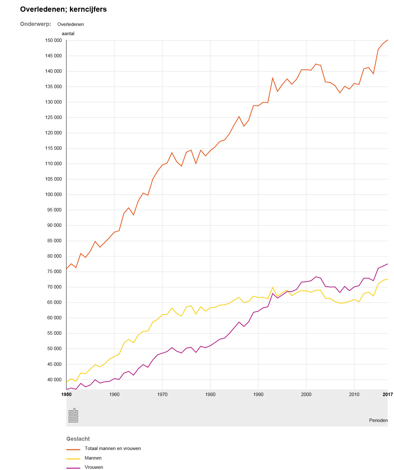 Overledenen naar geslacht vanaf 1950